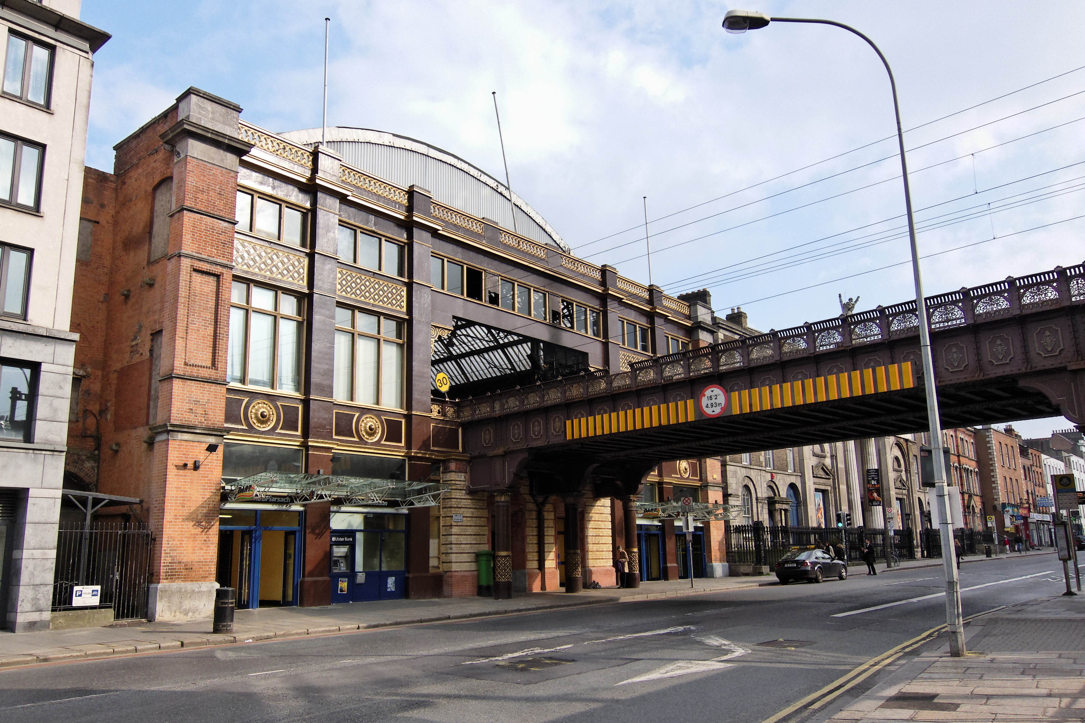 Estación Pearse Street. Dublín, Irlanda.